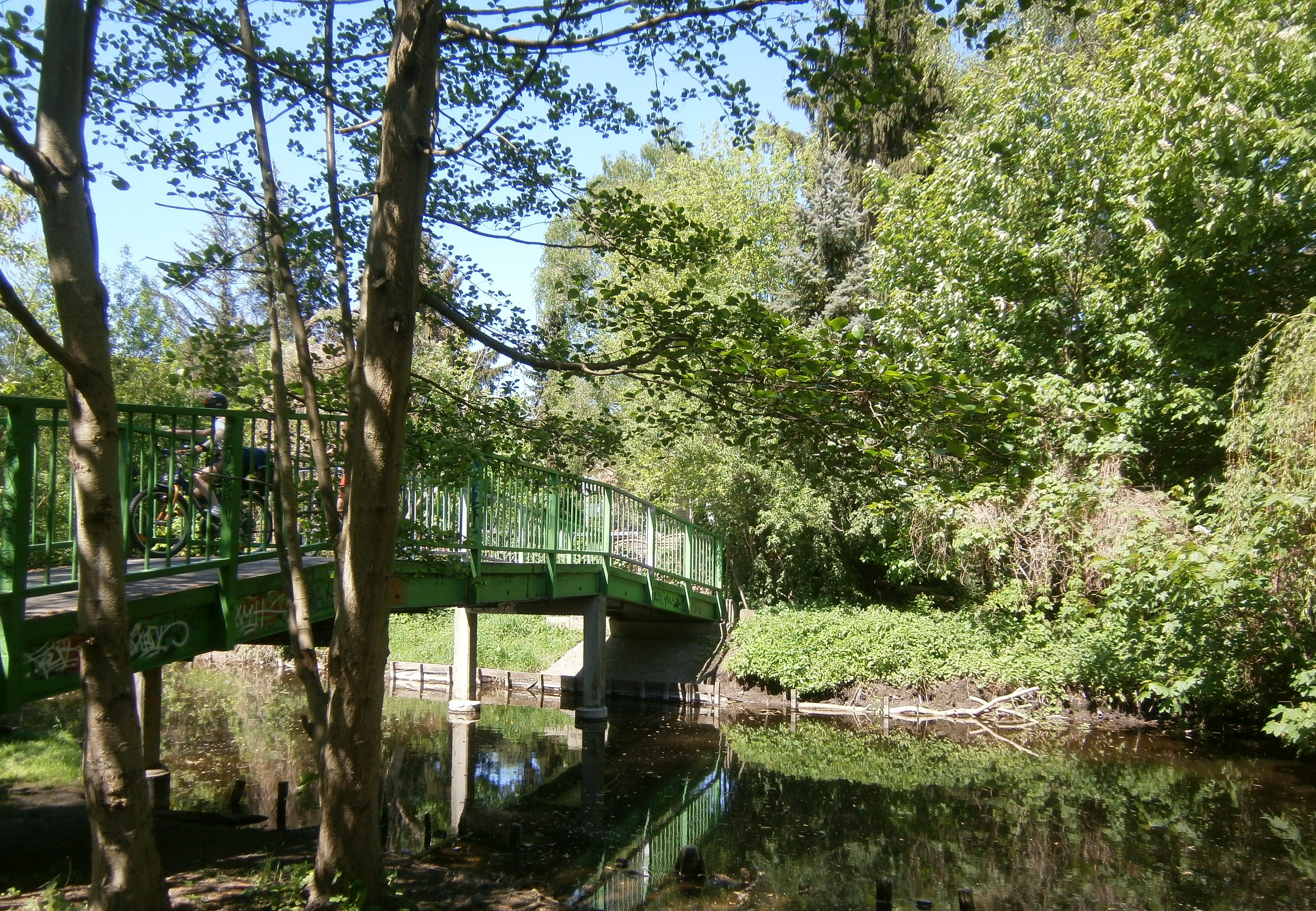 Der Barnimer Dörferweg ist ein Wander- und Erholungsweg im System der 20 Grünen Hauptwege in Berlin. Hier die Brückee über den dieser Wanderweg zwischen Hermsdorf und Waidmannslust das Tegeler Fließ kreuzt.